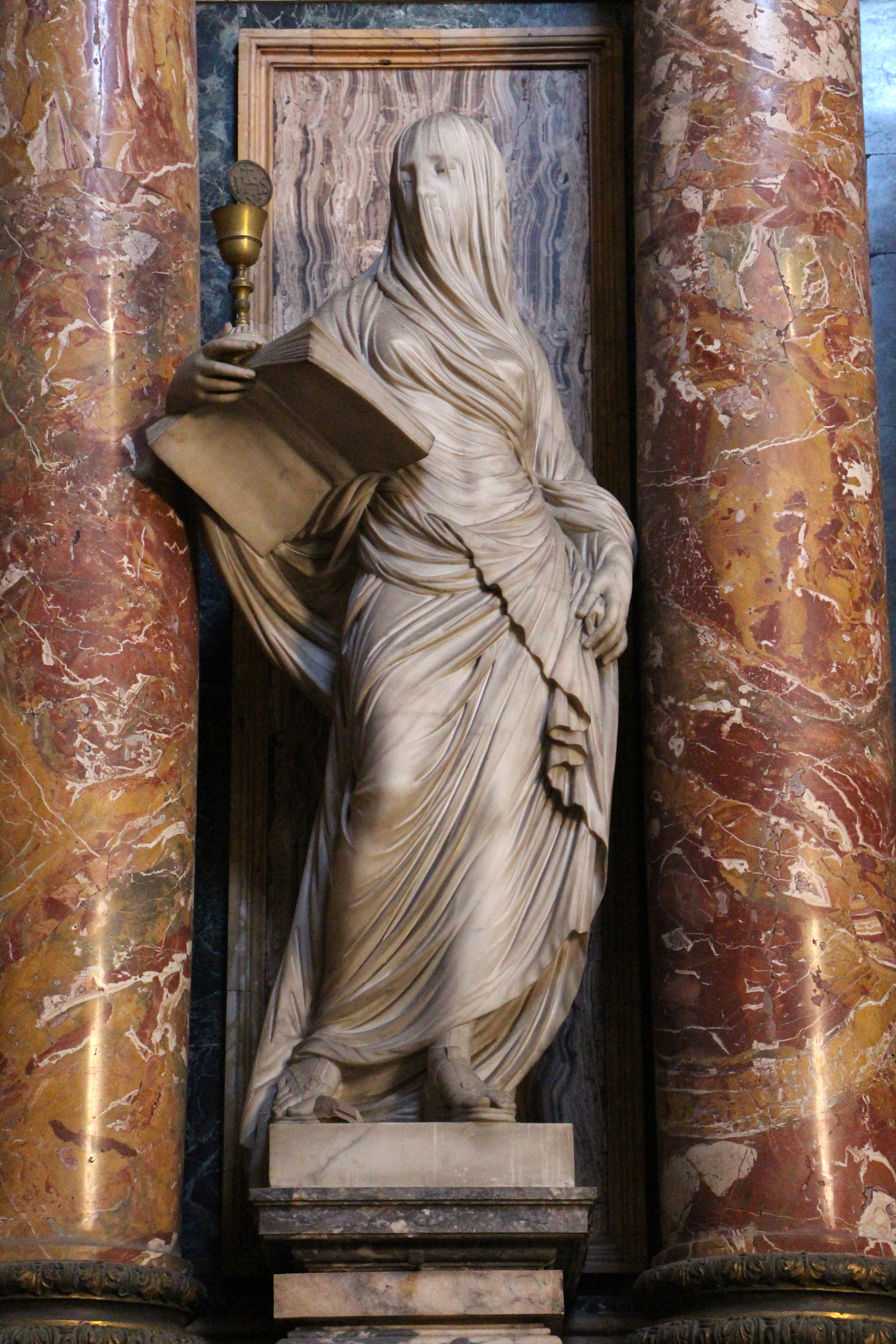 Santa Maria Maddalena de' Pazzi (Firenze) - Cappella Maggiore